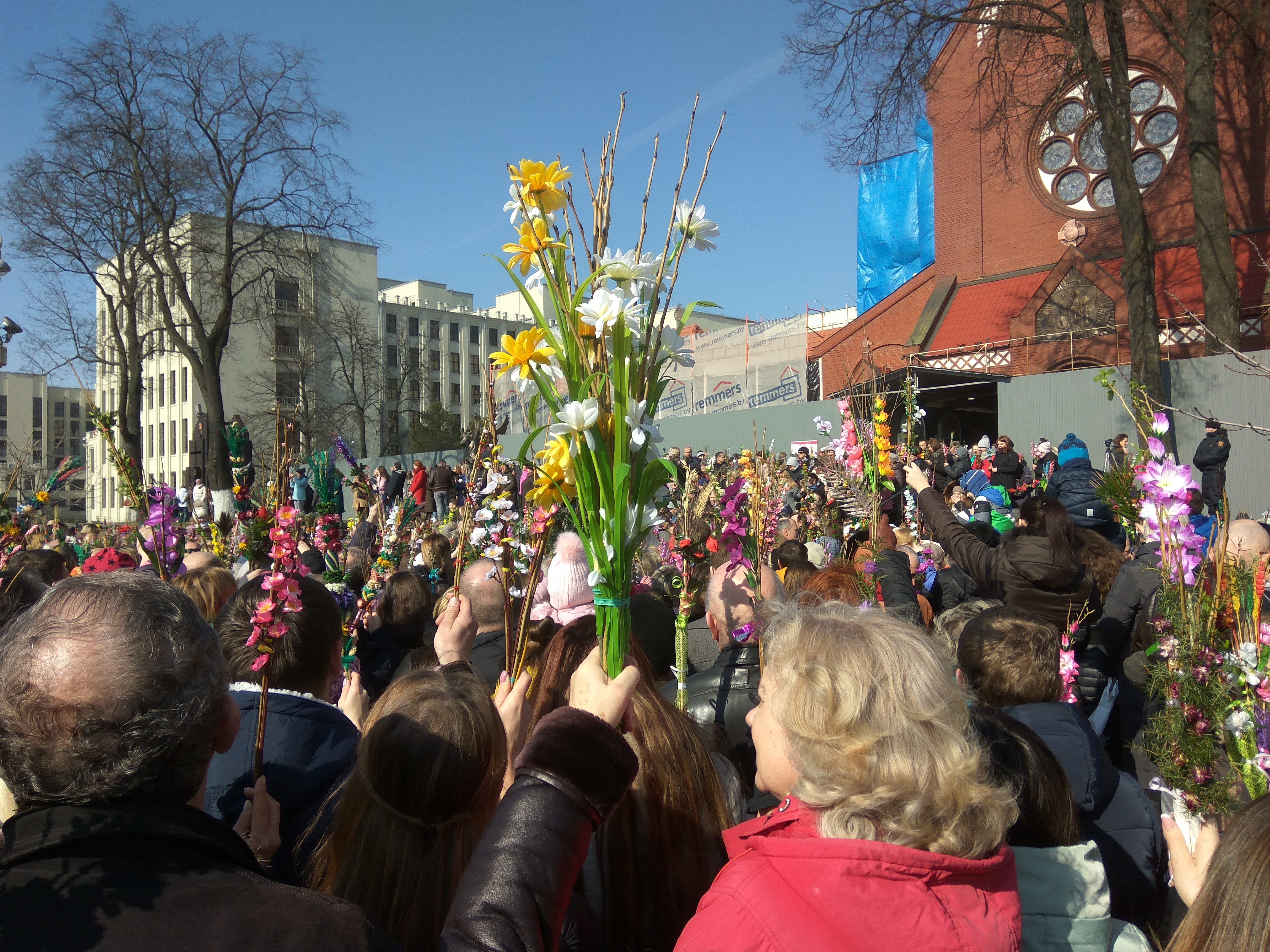 Пальмавая нядзеля каля Чырвонага касцёла ў Мінску. 2018